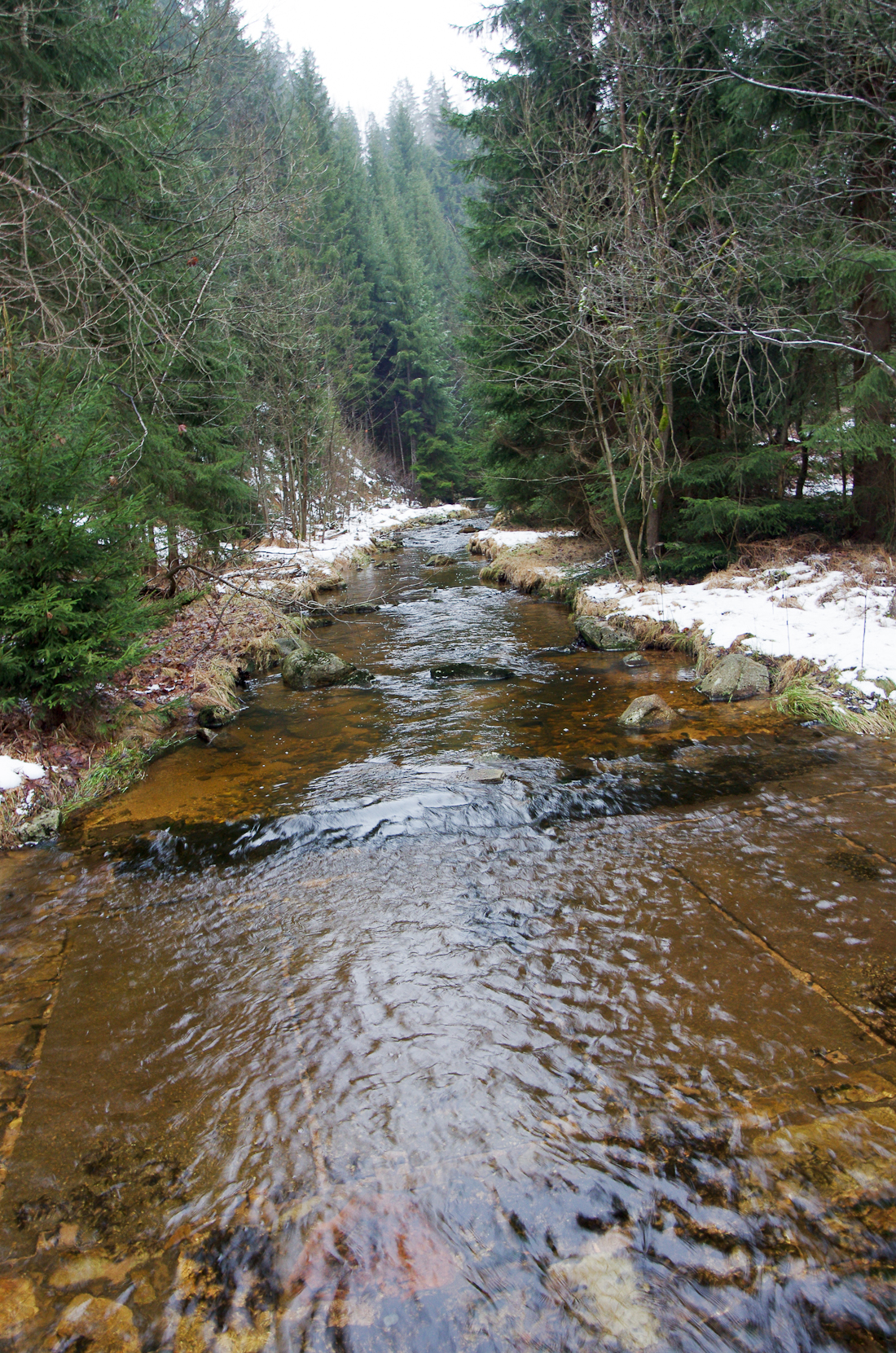 Rotava, Krušné hory, potok Skřiváň v místě nad Dolní Rotavou směrem na obec Šindelovou